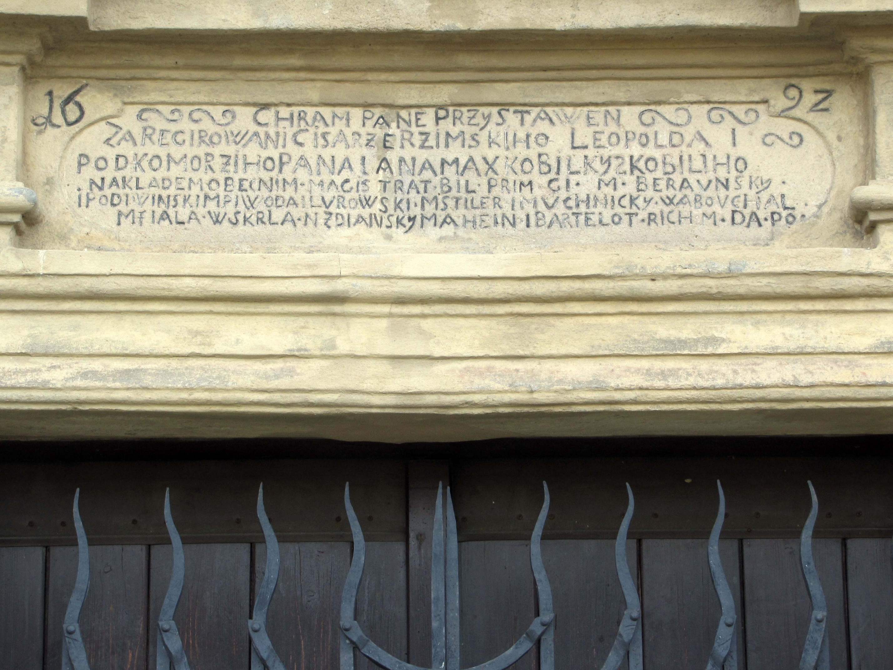 Nápis nad vchodem do kaple sv. Josefa v Kyjově. 1692 CHRAM PANE PRZYSTAVEN ZA REGIROWANI CISARZE RZIMSKIHO LEOPOLDA I - PODKOMORZIHO PANA IANA MAX KOBILKY Z KOBILIHO NAKLADEM OBECNIM. MAGISTRAT BIL PRIM CI M BERAVNSKY - I PODIVINSKI - M PIWODA - I LVROWSKI - M STILER - I MVCHNICKY - W BOVCHAL - M FIALA - W SKRLA - N ZDIANSKY - MAHEIN - I BARTELOT - RICH M - DA- PO Volný překlad: 1692 Chrám Páně přistavěn za panování římského císaře Leopolda I., podkomořího pana Jana Maxe Kobilky z Kobilího nákladem obecním. Magistrát byl: primátor Berounský, J. Podivínský, M. Pivoda, J. Lurovský, M. Stiler, J. Muchnický, W. Bouchal, M. Fiala, W. Škrla, N. Ždánský, Mahein, J. Bartelot, Rich...